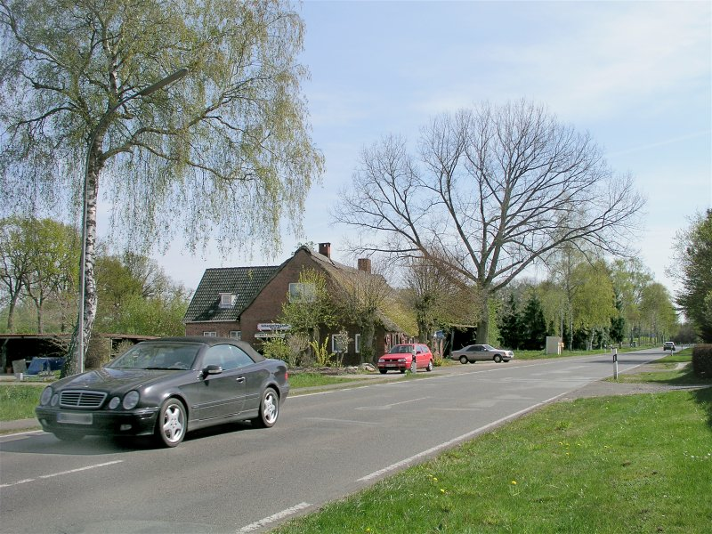 Heidgraben Nord-West Betonstraße 2007